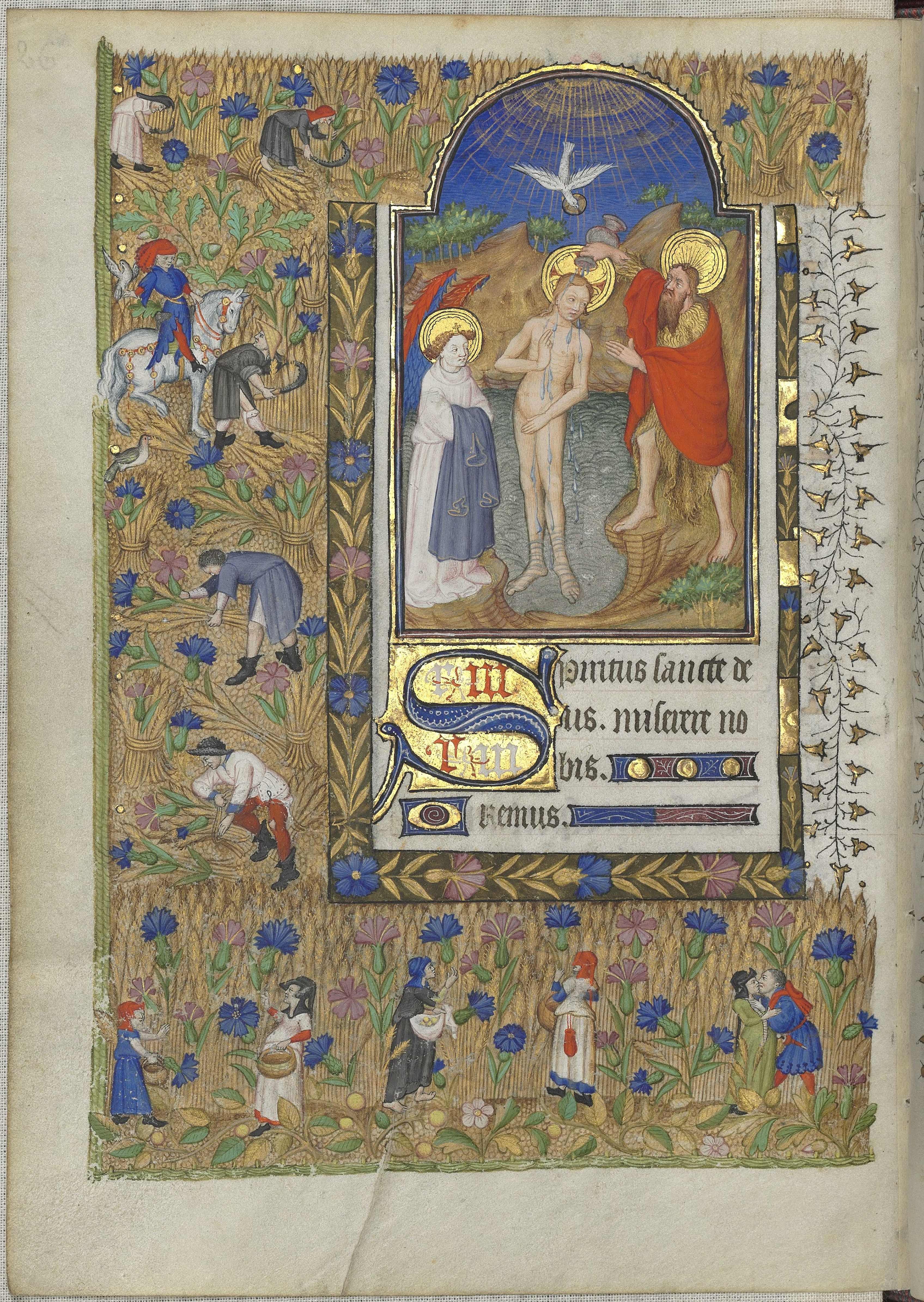 Horae ad usum romanum, Livre d'Heures de Marguerite d'Orléans (1406–1466), feuillet 161v., miniature du baptême du Christ avec des scènes de récoltes dans les marges.